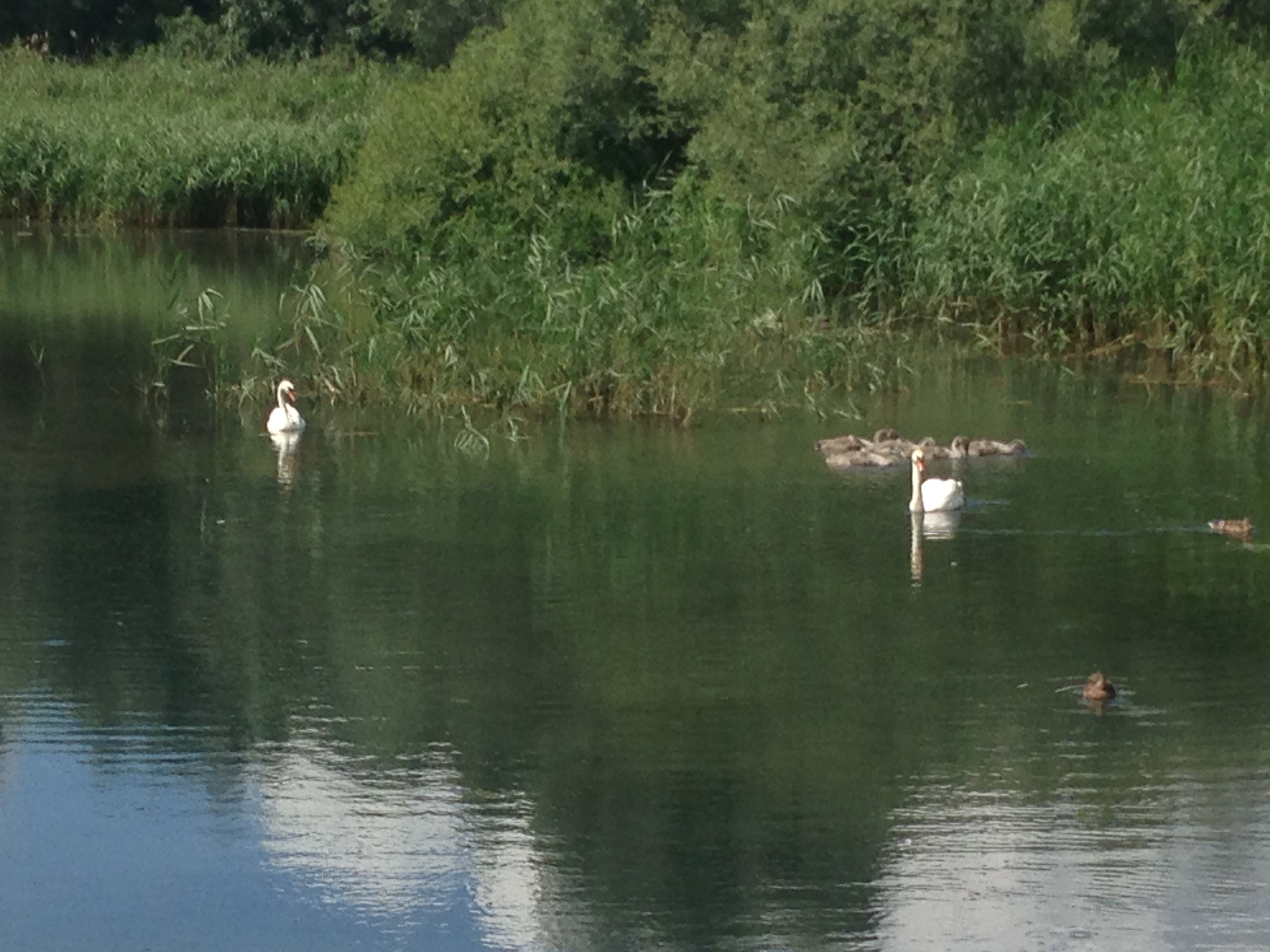 rodzina łabędzi, staw Piekarnicza (Piecki-Migowo).